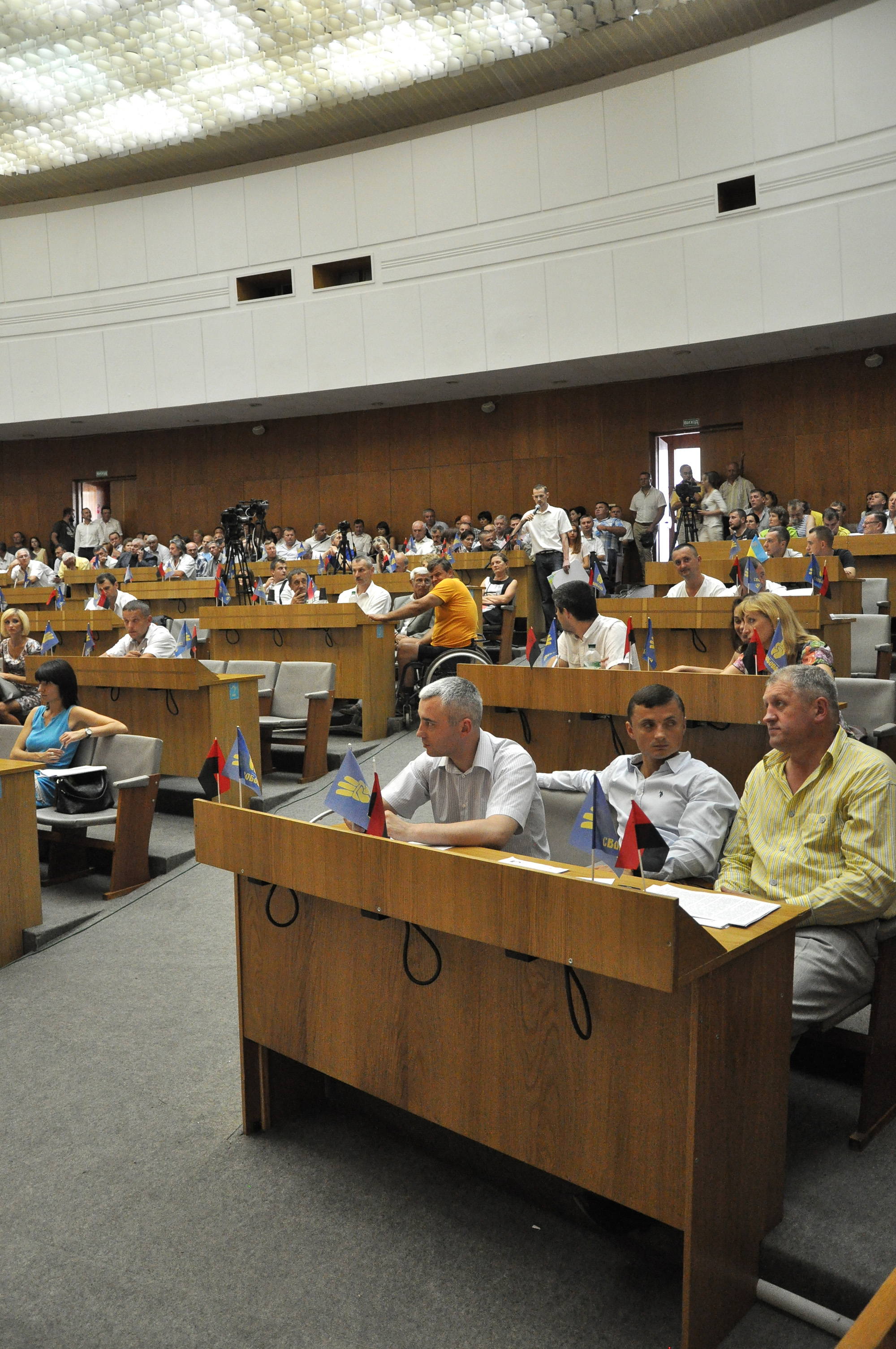 4-те пленарне засідання 52-ої сесії Тернопільської обласної ради 13 серпня 2015 року. У передньому ряду справа — заступник голови Тернопільської ОДА Леонід Бицюра і народний депутат України Михайло Головко.